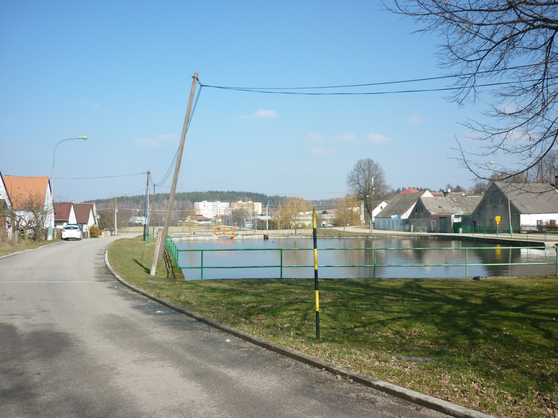 Střížovice - horní návesní rybník